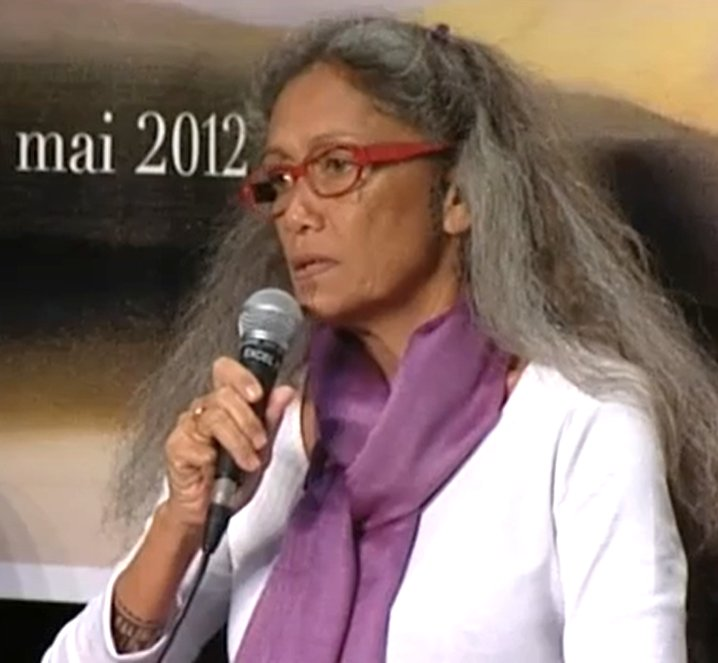 Extrait de la vidéo d'un café littéraire au Festival Étonnants Voyageurs 2012 avec Chantal Spitz, animé par Maëtte Chantrel, Michel Abescat